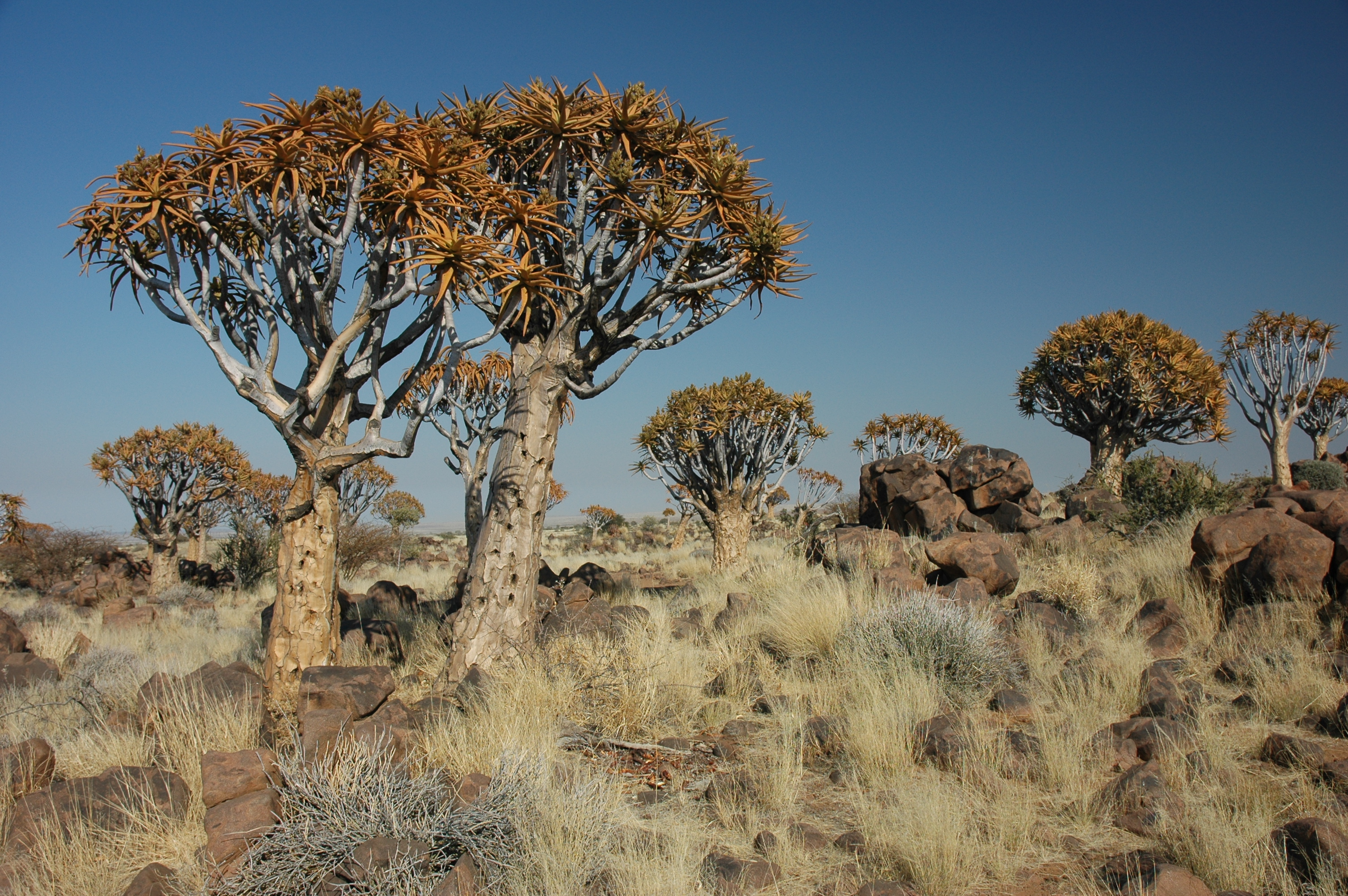 Namibie Quivertree Forest Photographie prise par GIRAUD Patrick